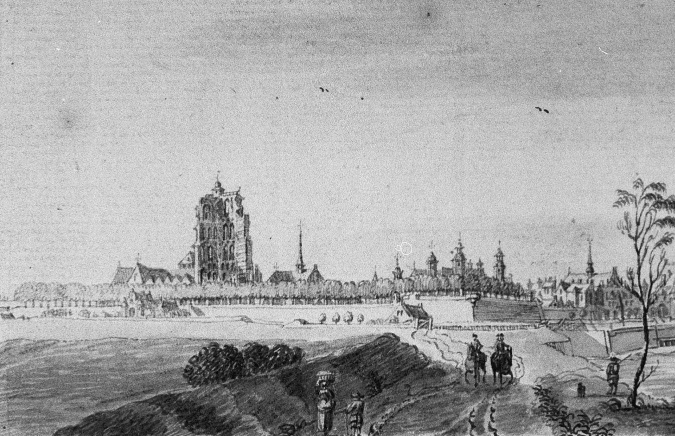 Gedeelte van de tekening Venlo vanuit het noorden van J. de Beyer uit 1745.